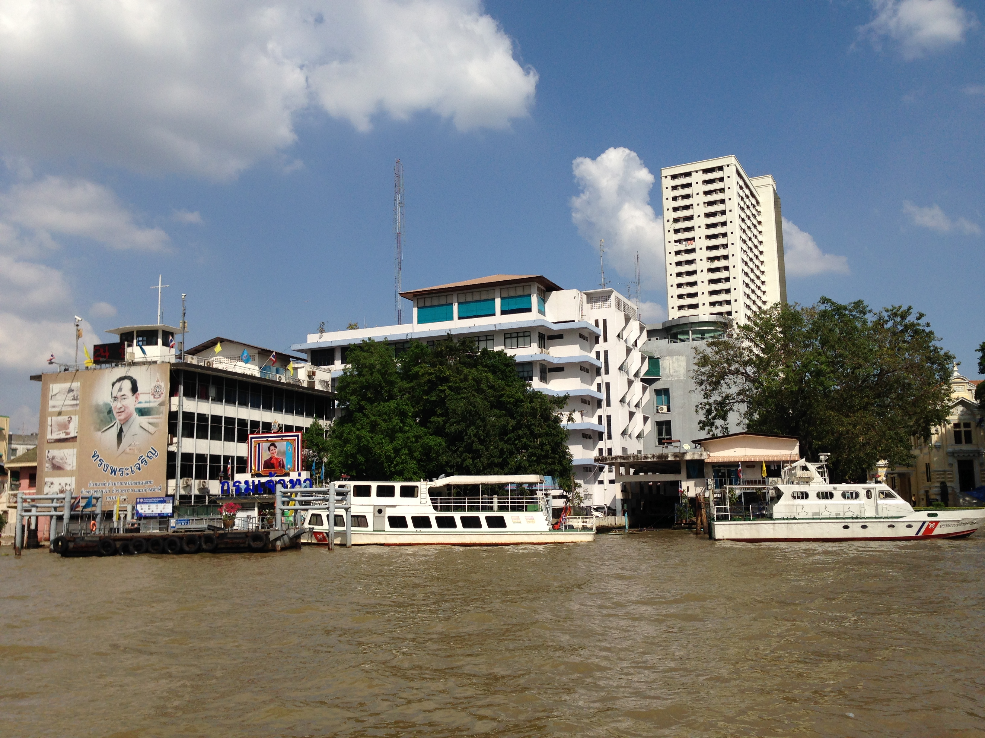 Tha Ruea krom chao Tha, samphanthawong,Bangkok, thailand